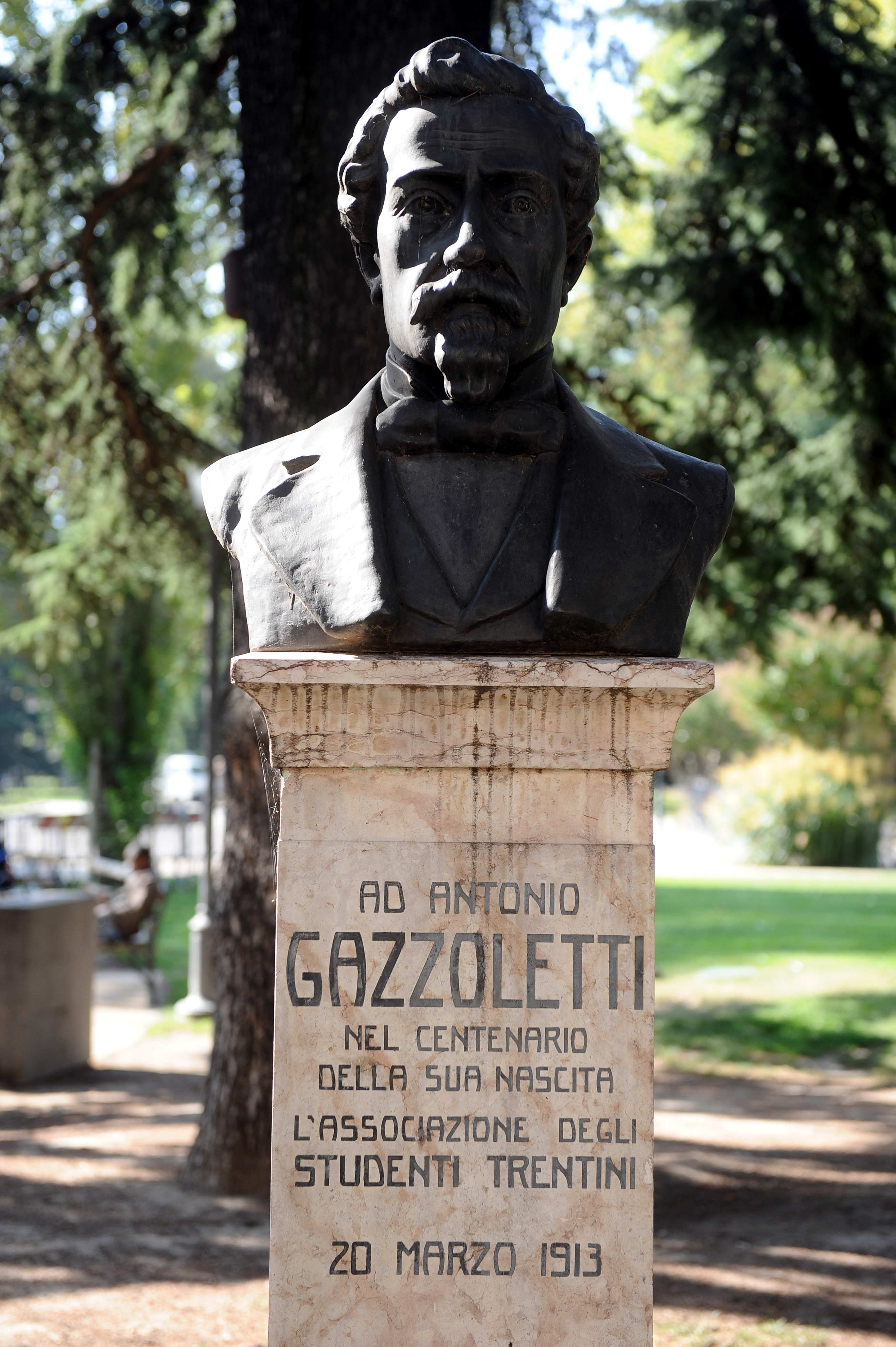 Busto di Antonio Gazzoletti This is a photo of a monument which is part of cultural heritage of Italy.